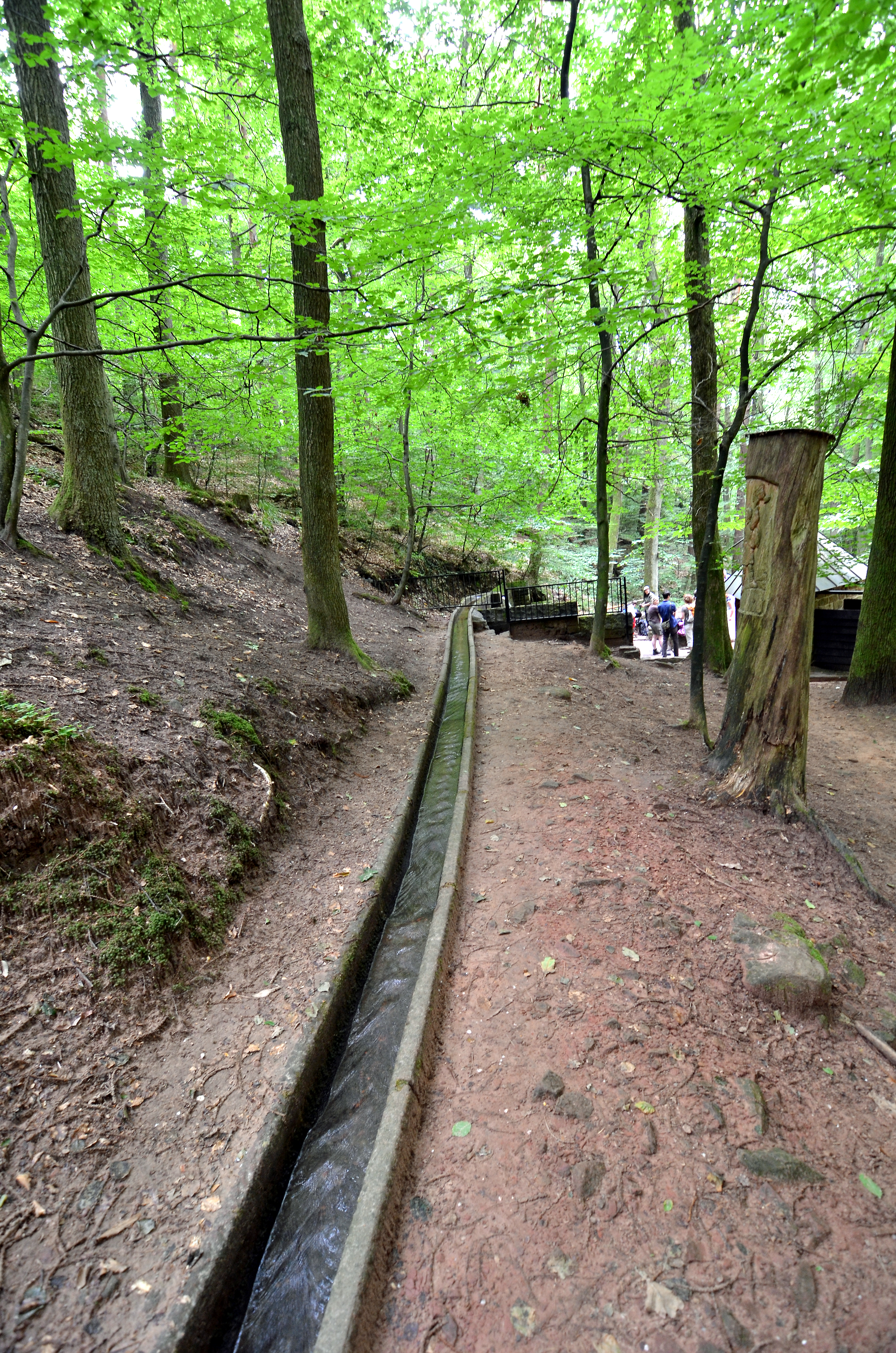 Wasserzulauf zur Walddusche